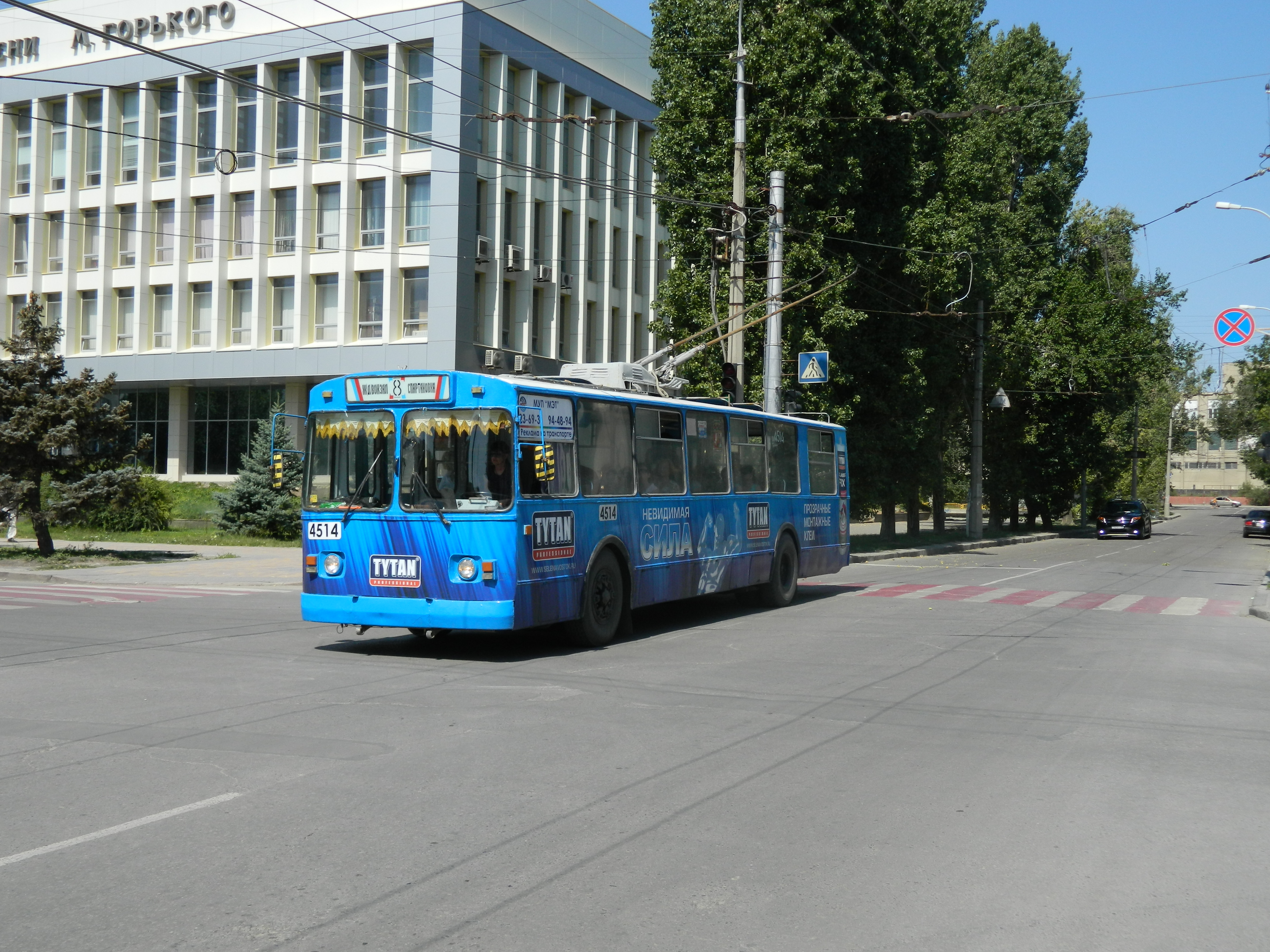 Троллейбус на улице Порт-Саида